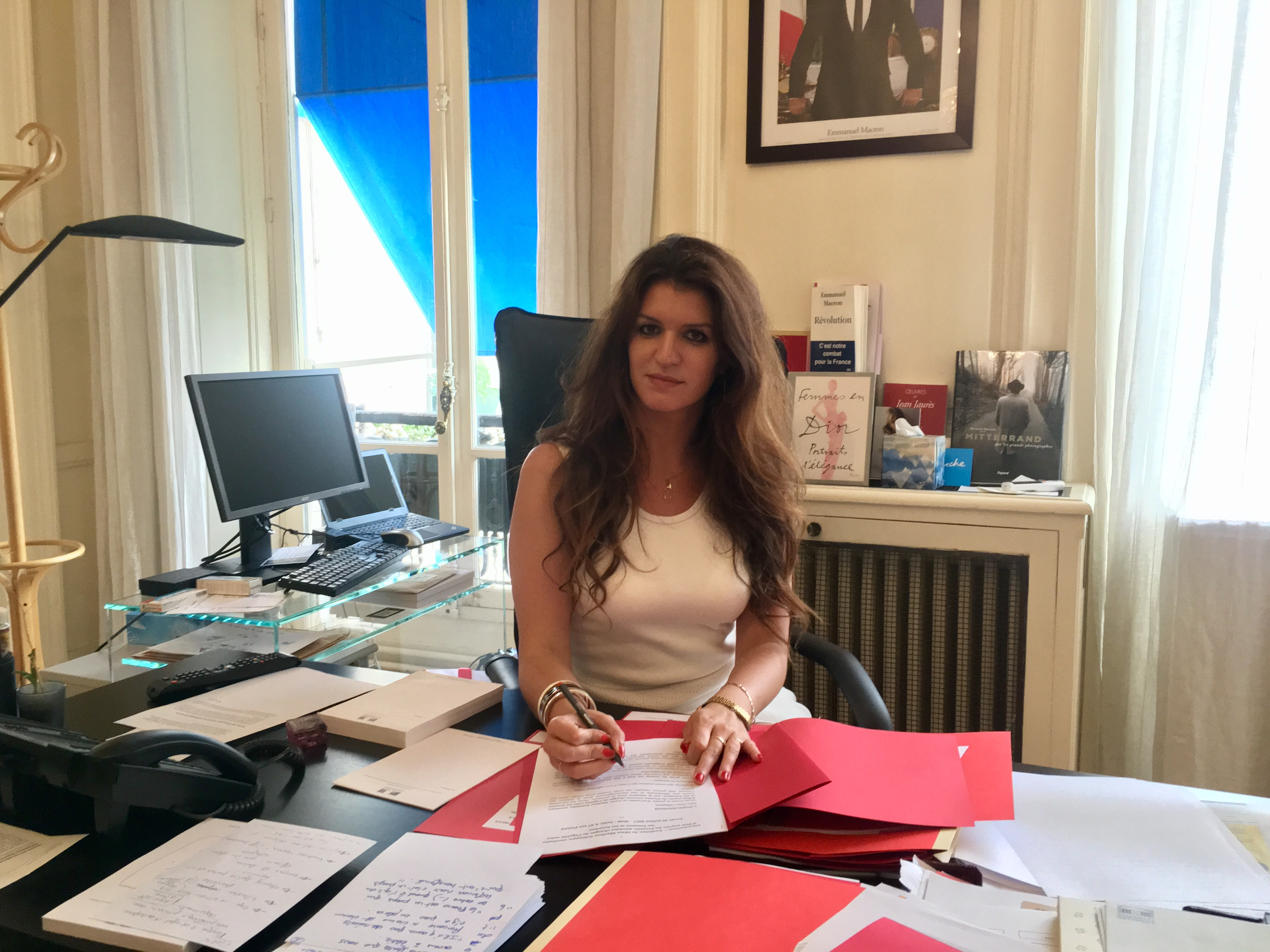 Marlène Schiappa, secrétaire d'Etat auprès du Premier ministre, chargée de l'égalité entre les femmes et les hommes, dans son bureau.